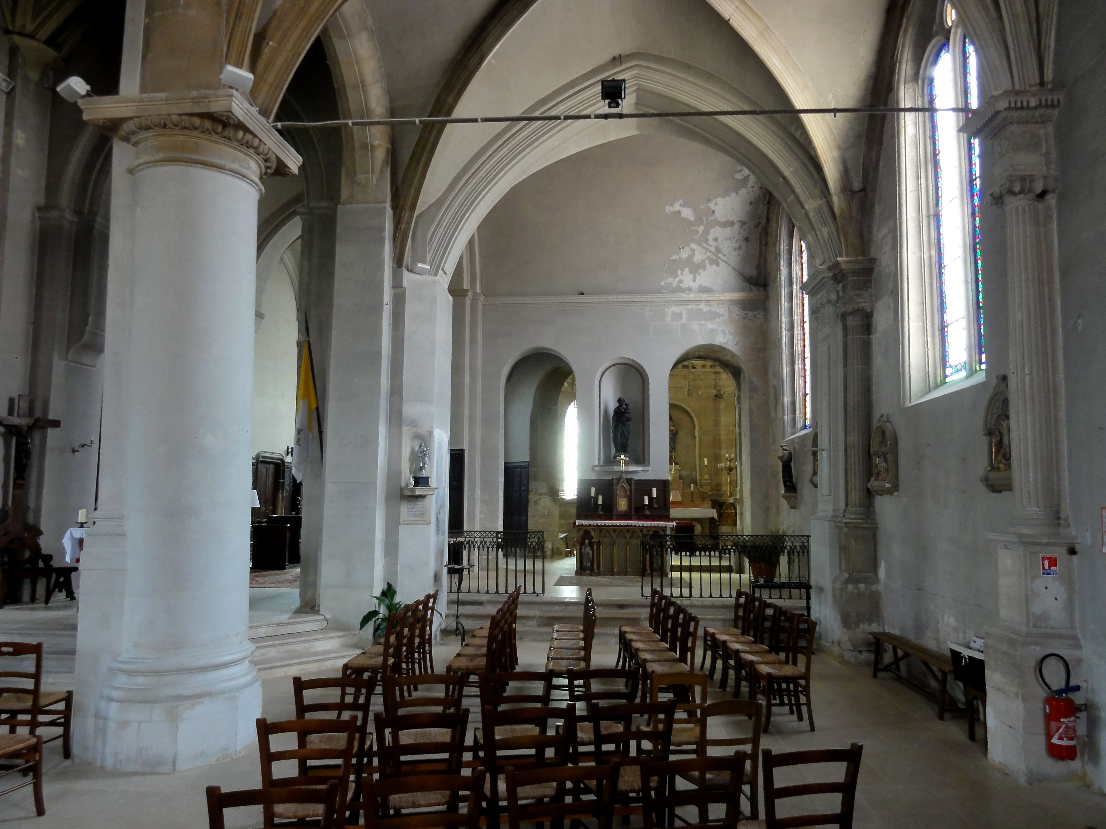 Bas-côté sud, vue vers l'est.